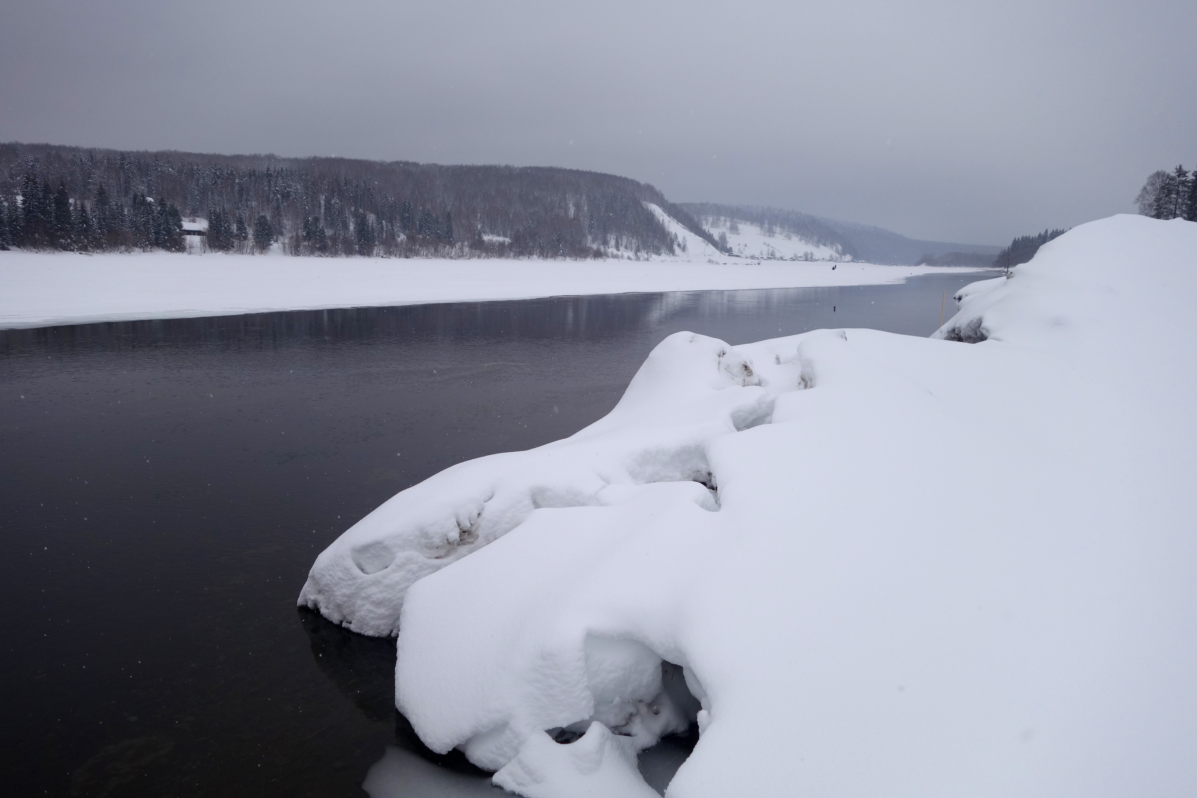 Река Вишера: Красновишерский район, Пермский край This image is related to the protected area of Russia number 5910206